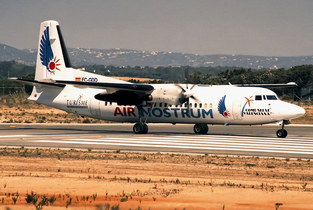 Fokker 50 Faro (FAO / LPFR) Portugal, 1997 EC-GDD (cn 20160)